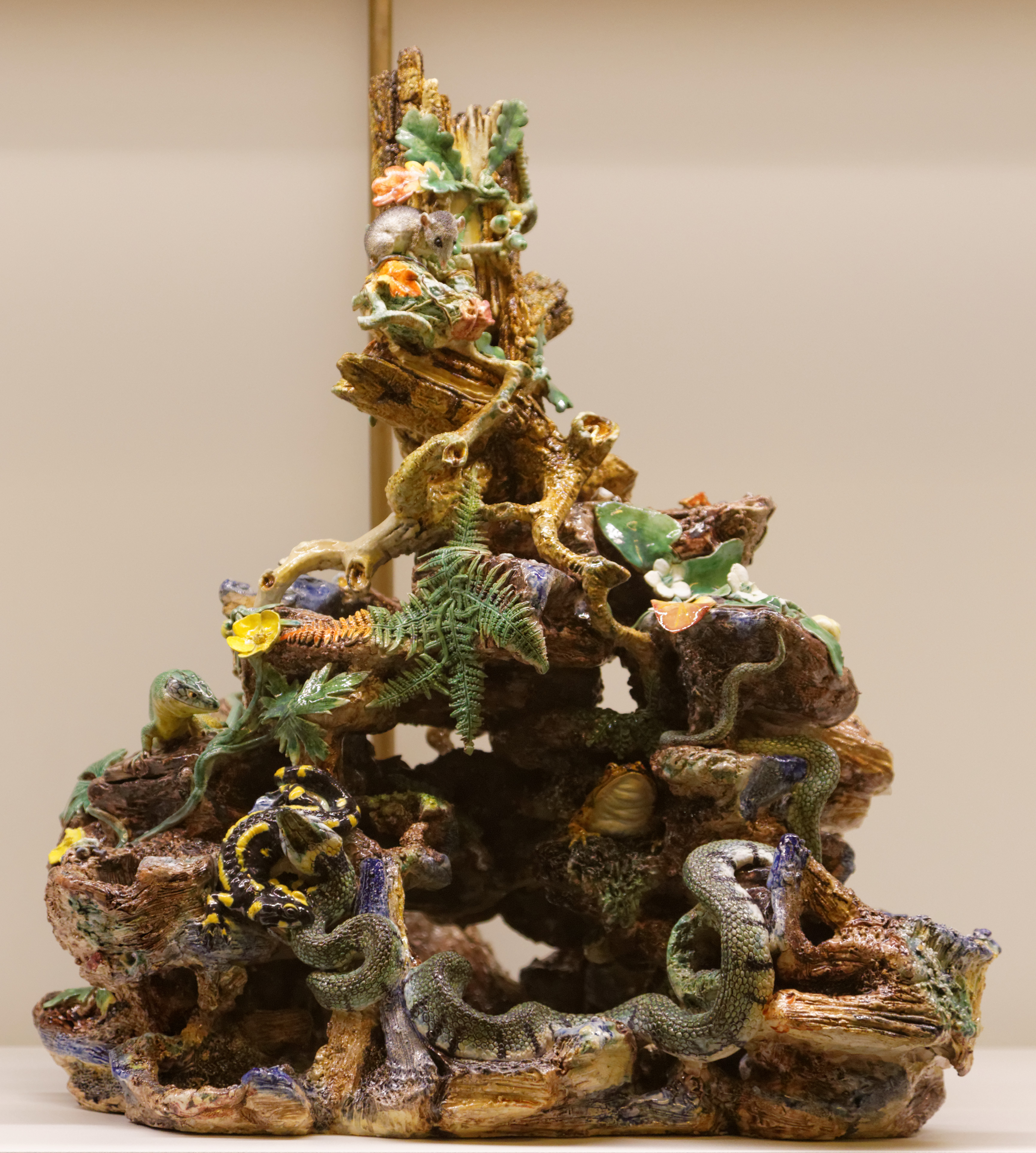 Surtout de table en forme de rocher Charles-Jean Avisseau (1795-1861) Tours, 1860 Présenté à l'Exposition universelle de 1867 faïence émaillée don Madame Briandet, Monsieur Briandet, Mademoiselle Briandet, 1903 Inventaire 10573 Musée des Arts Décoratifs, Paris